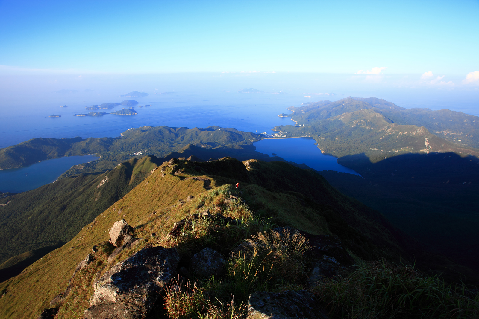 Lantau Peak